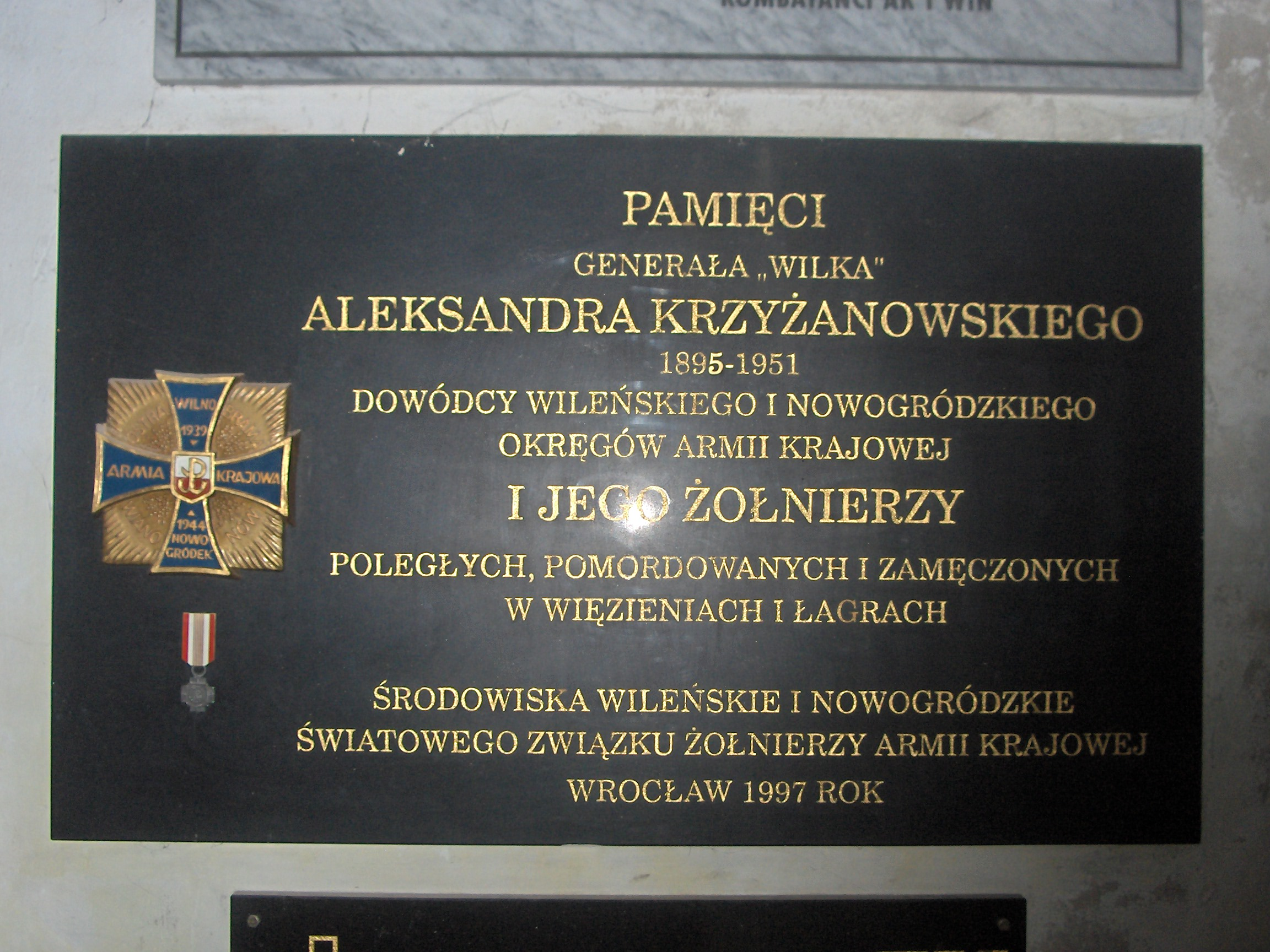 Tablica pamiątkowa w bazylice św. Elżbiety we Wrocławiu, poświęcona ge. Aleksandrowi Krzyżanowskiemu "Wilkowi" oraz podległym mu żołnierzom AK.